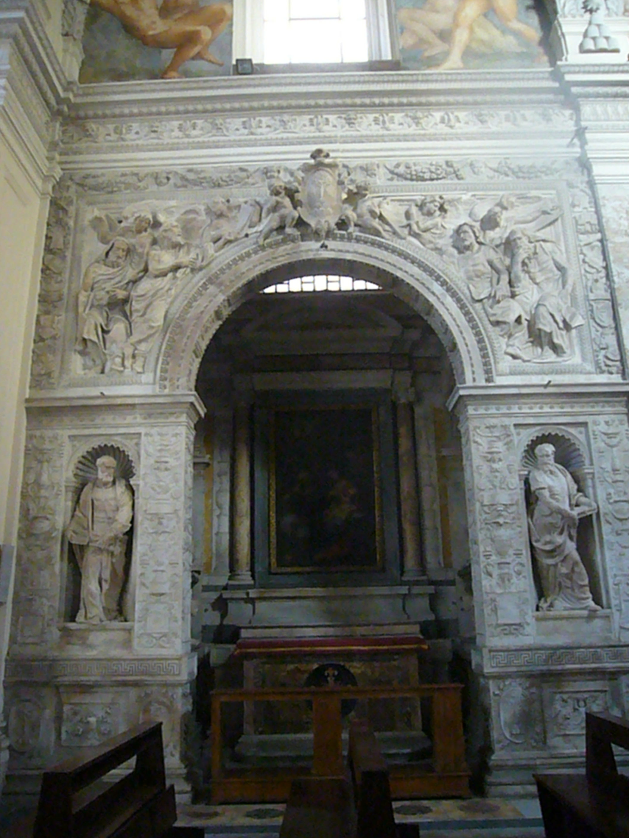 Roma, santa Maria della Pace. Cappella Cesi